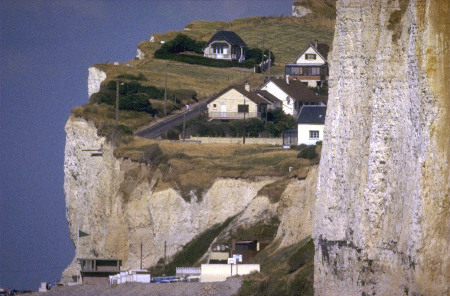 Steilküste in Criel-plage-sur-mer, Normandie, Frankreich